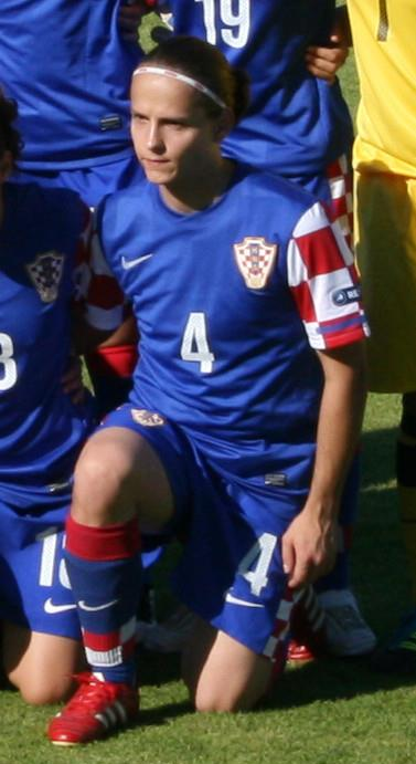 Kristina Nevrkla